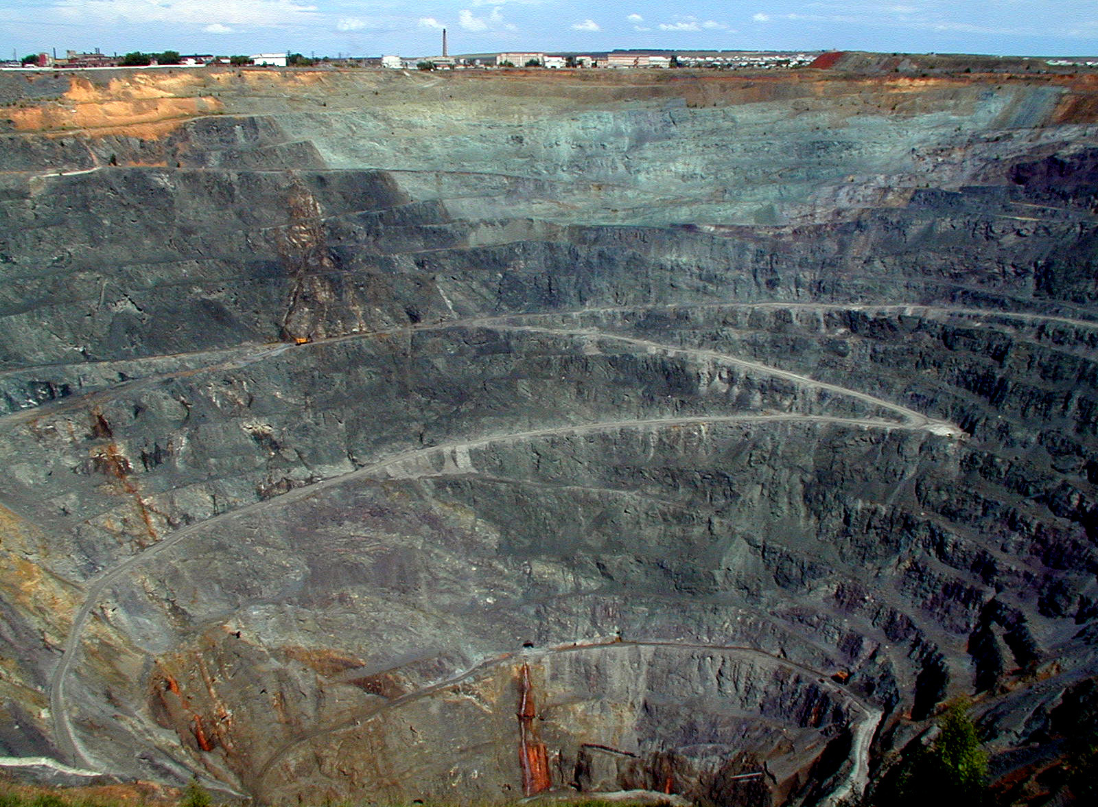 г. СИБАЙ Карьер